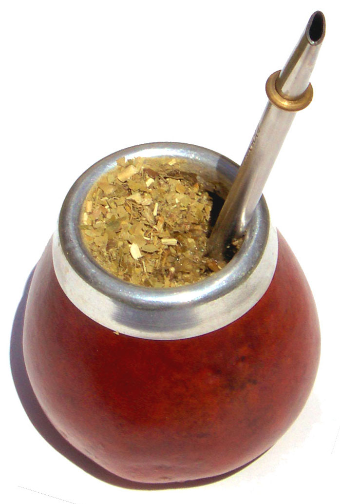 Jorge Alfonso Hernández Aguirre